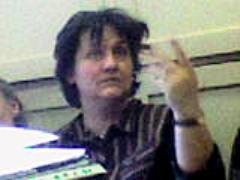 Elena Berezovich